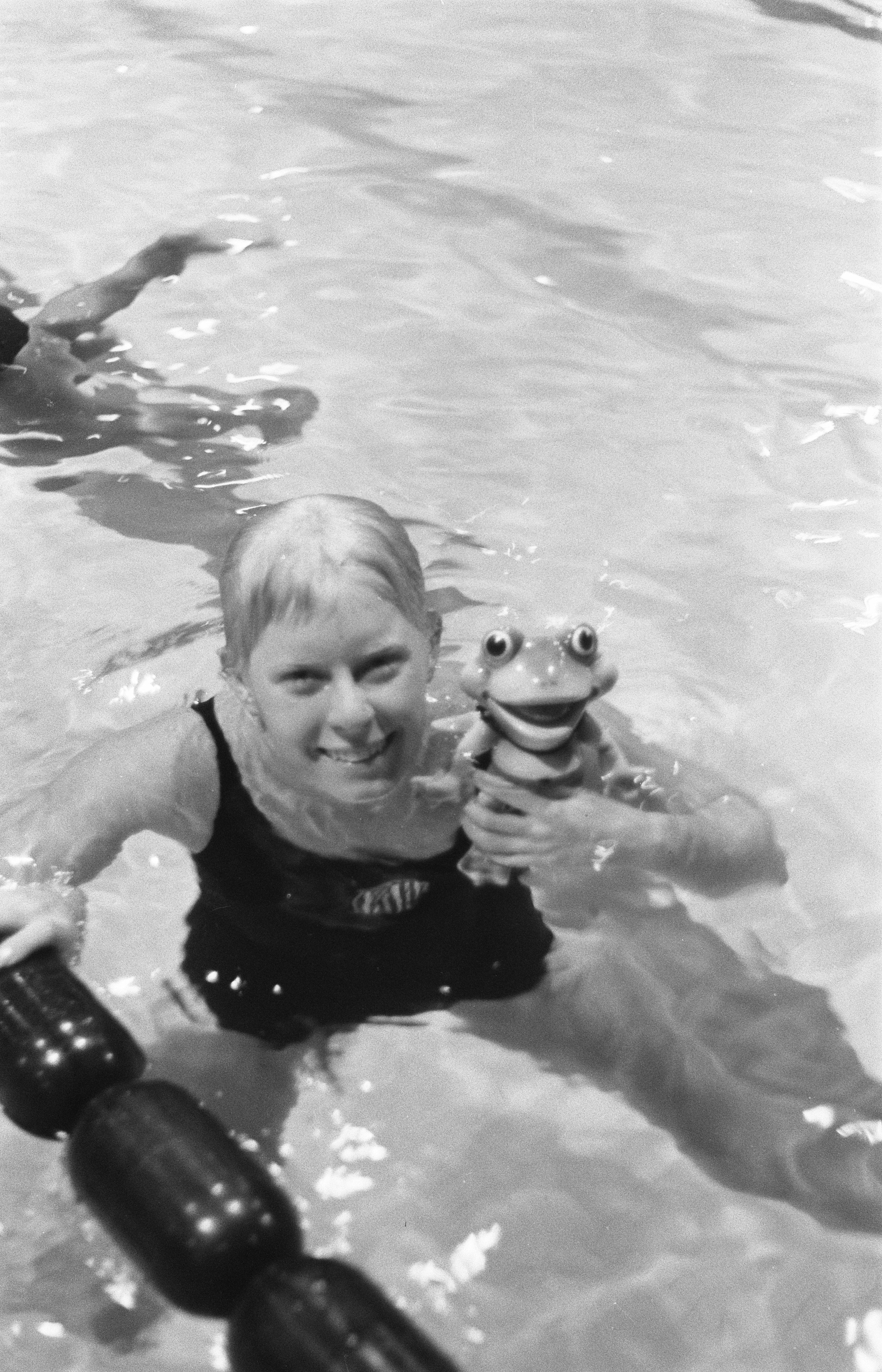 Collectie / Archief : Fotocollectie Anefo Reportage / Serie : [ onbekend ] Beschrijving : Olympische Spelen te Rome, Chris Von Saltzo met mascotte Datum : 11 september 1960 Locatie : Italië, Rome Trefwoorden : sport, zwemmen Persoonsnaam : Saltzo Chris Von Instellingsnaam : Olympische Spelen Fotograaf : Pot, Harry / Anefo Auteursrechthebbende : Nationaal Archief Materiaalsoort : Negatief (zwart/wit) Nummer archiefinventaris : bekijk toegang 2.24.01.05 Bestanddeelnummer : 911-5859